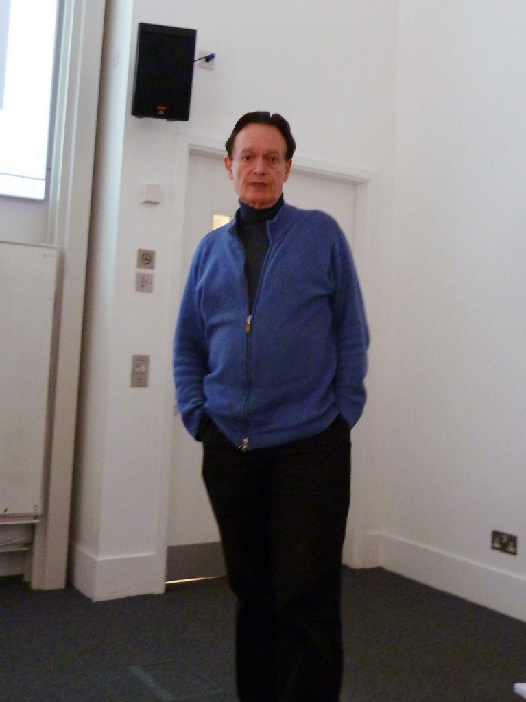 Martin Kemp 01